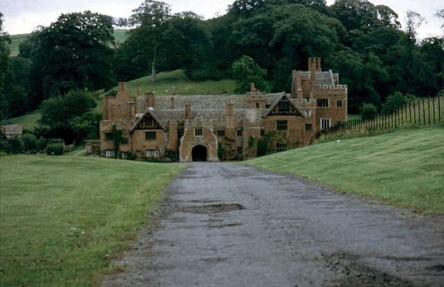 Compton Wynyates (circa 1983)